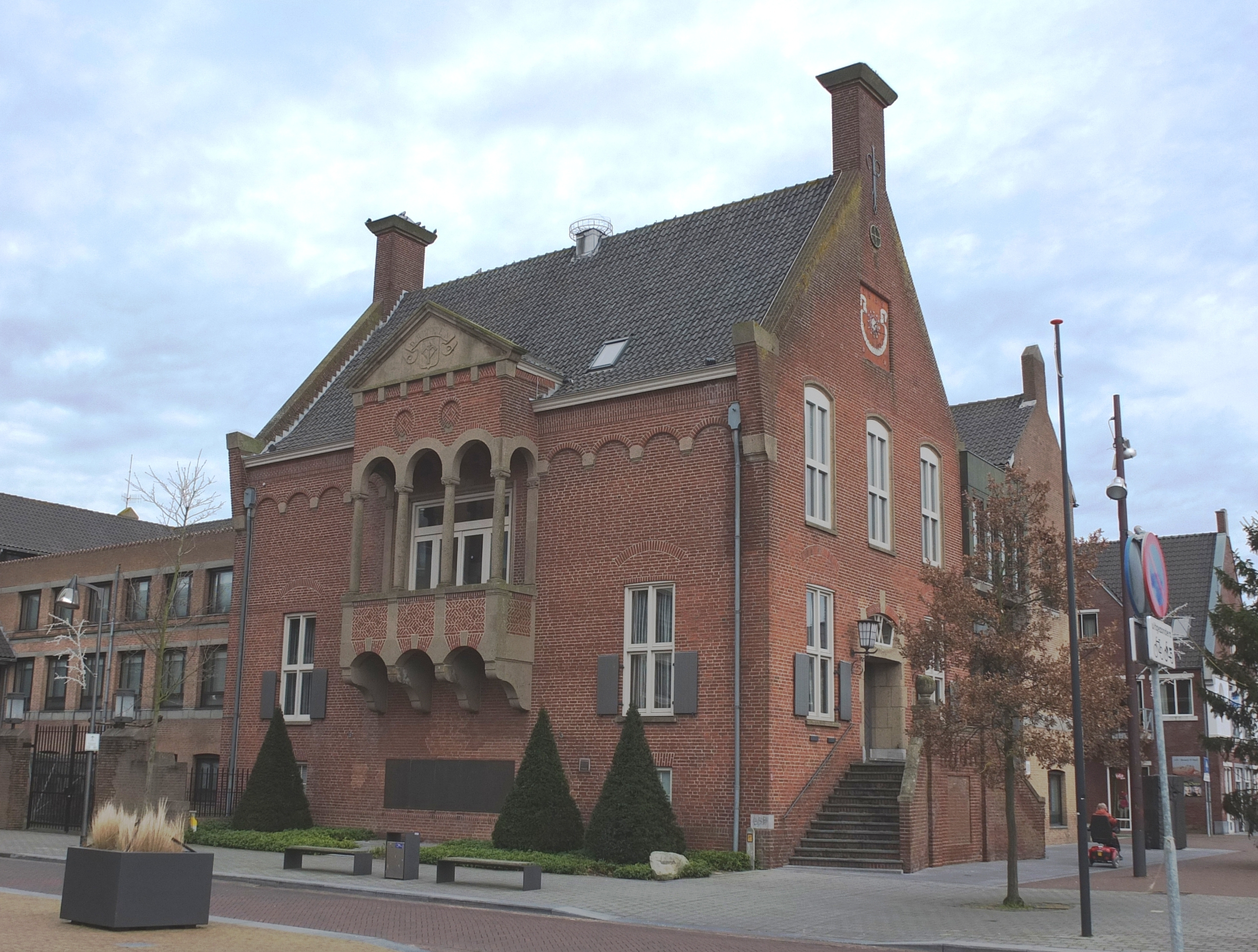 Zicht op het Raadhuis van Drunen aan het Raadhuisplein 16 in het centrum van Drunen